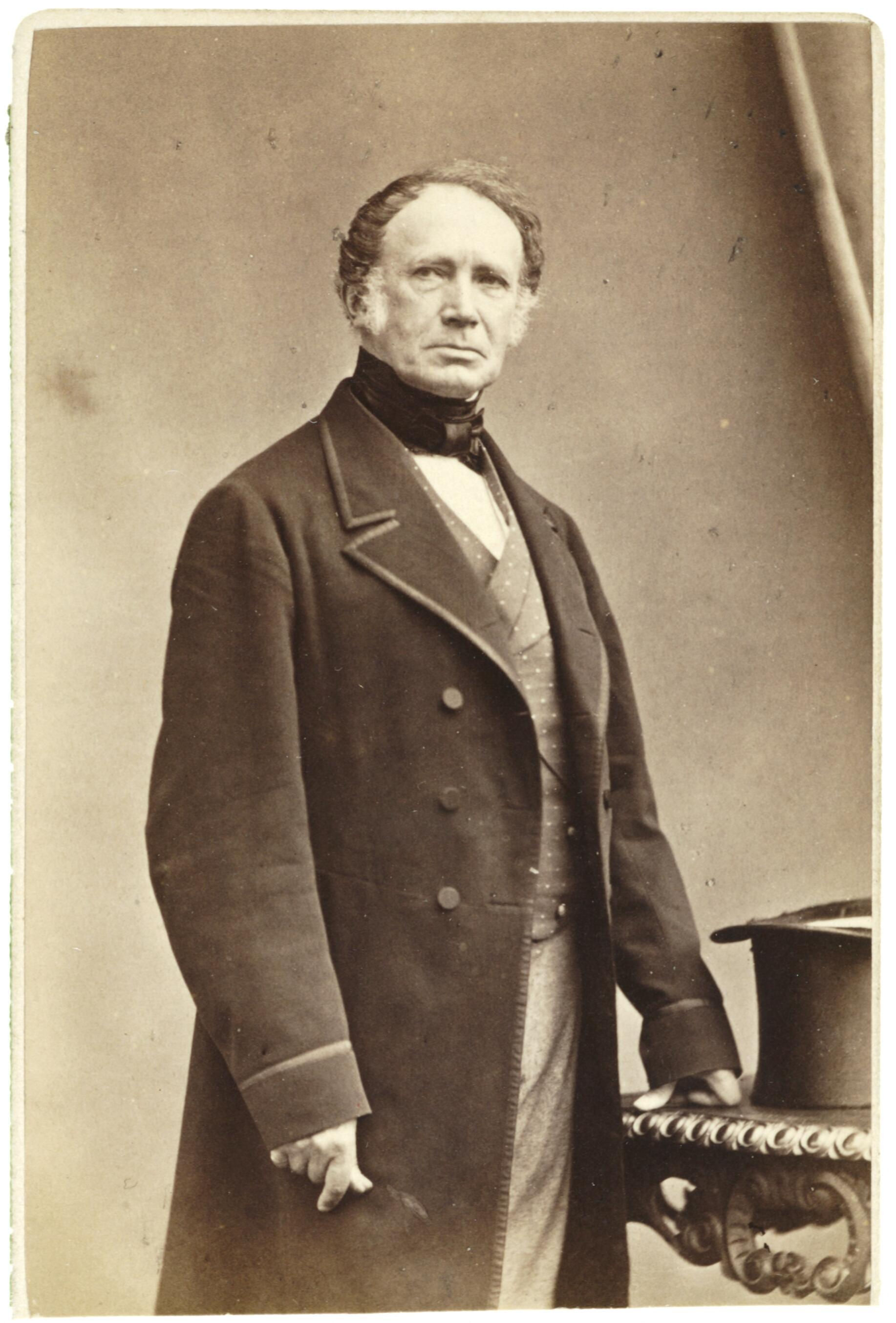 Portret van Willem Frederik Karel van Oranje-Nassau (1797-1881)